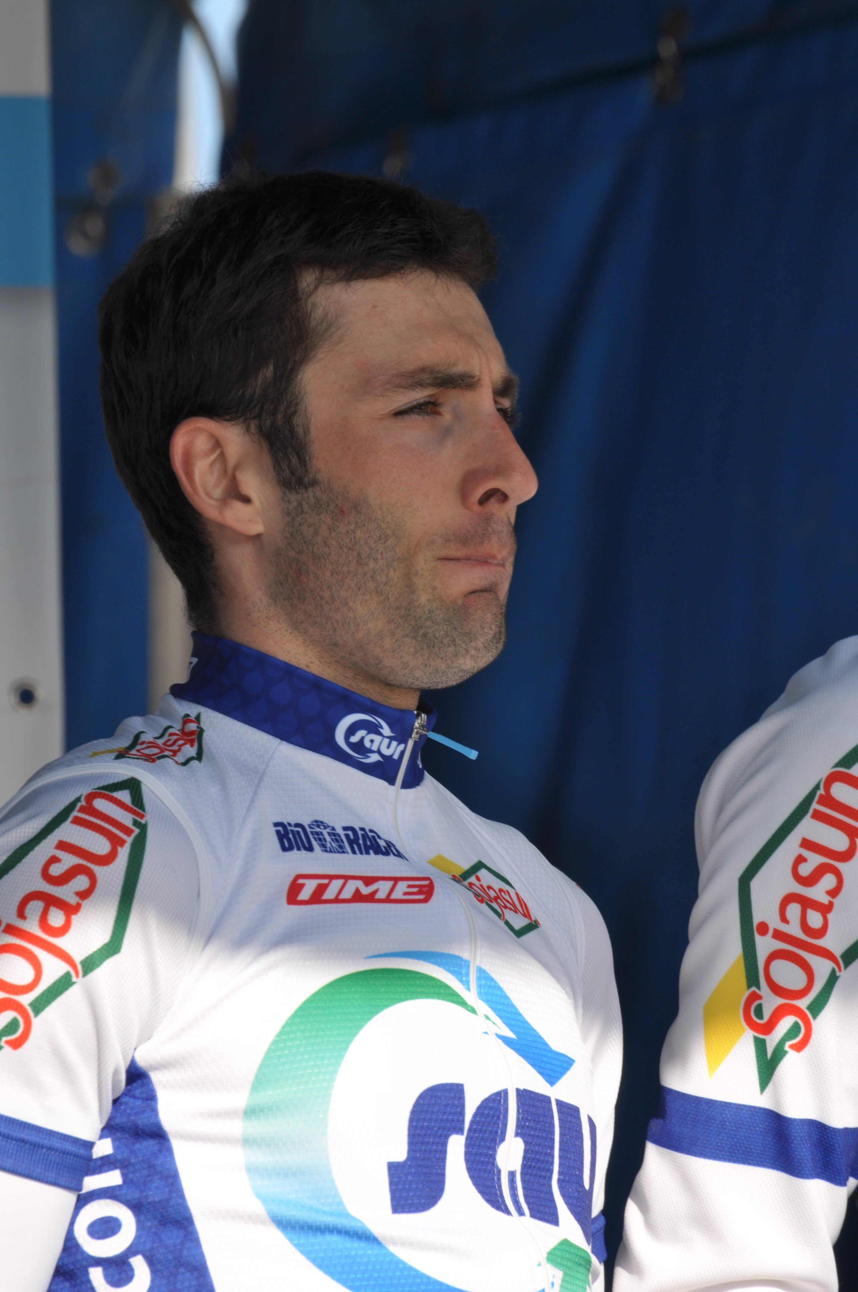 Boucles du Sud Ardèche-Souvenir Francis Delpech 2012.